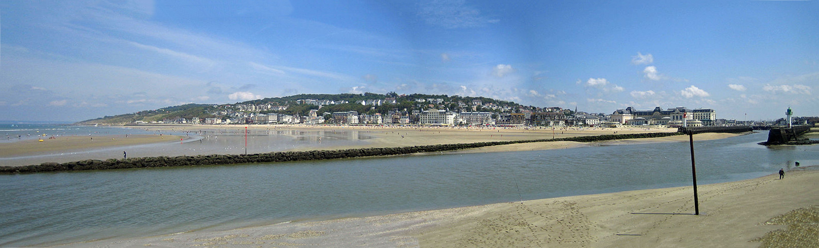 Vue panoramique de la plage de Trouville-sur-Mer, Calvados, France.Unknown beach of trouville-sur-mer, normandy, france